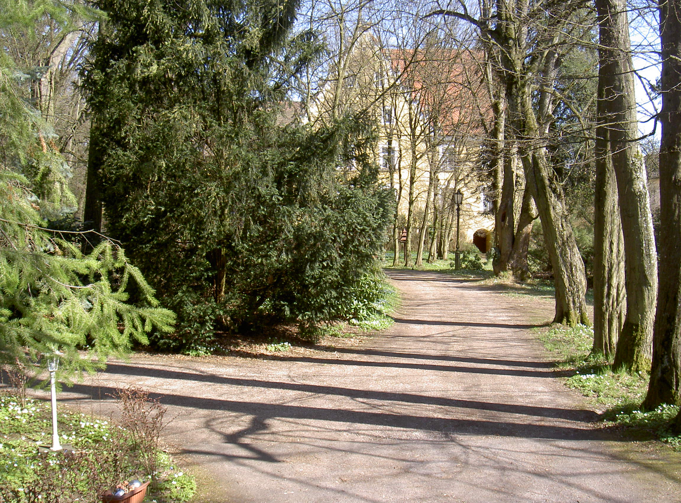 Hofmarkschloss (Rothenstadt)